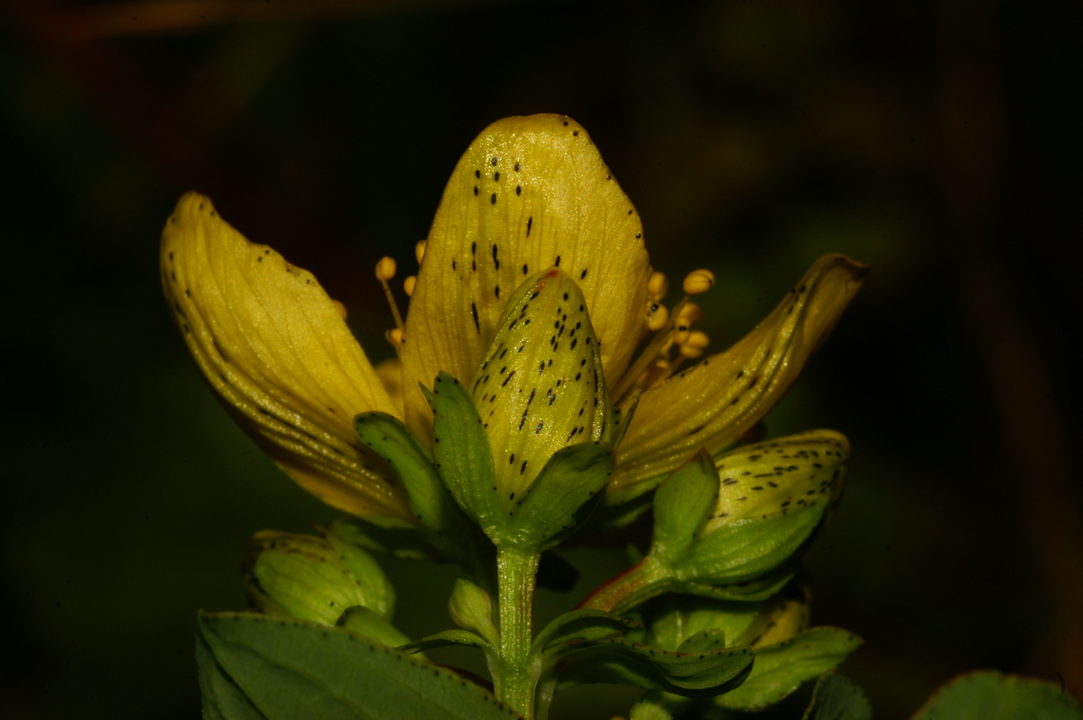 Pegasta krčnica na Soriški planini.